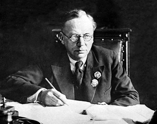 Vladimir Wiese